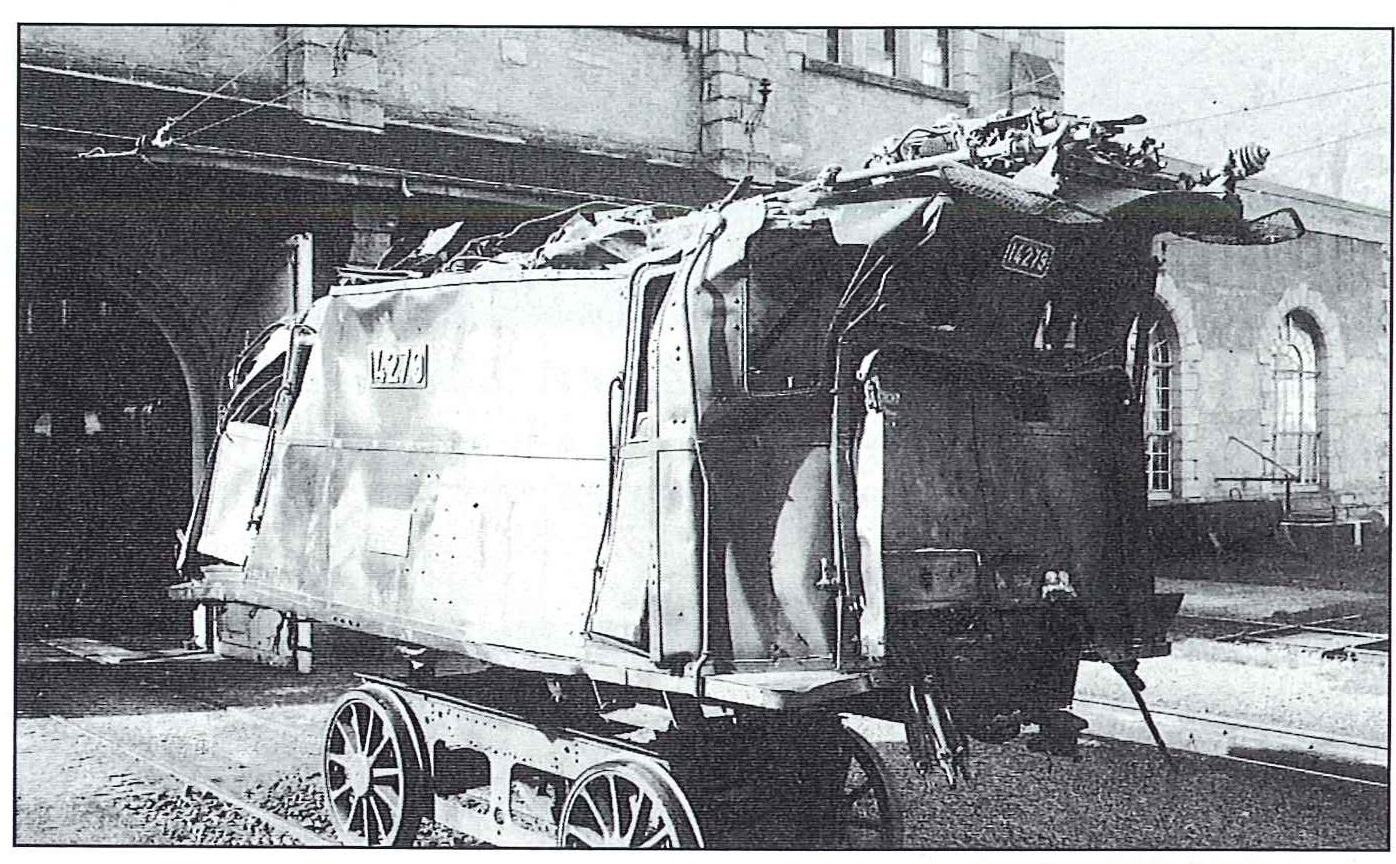 Mittelteil der am 2. Oktober 1942 in Tüscherz verunfallten Ce 6/8 III 14279. Die Lokomotive wurde in der Hauptwerkstätte Bellinzona wieder aufgebaut.